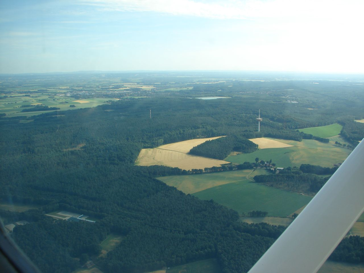 Dammer Berge aus der Luft.